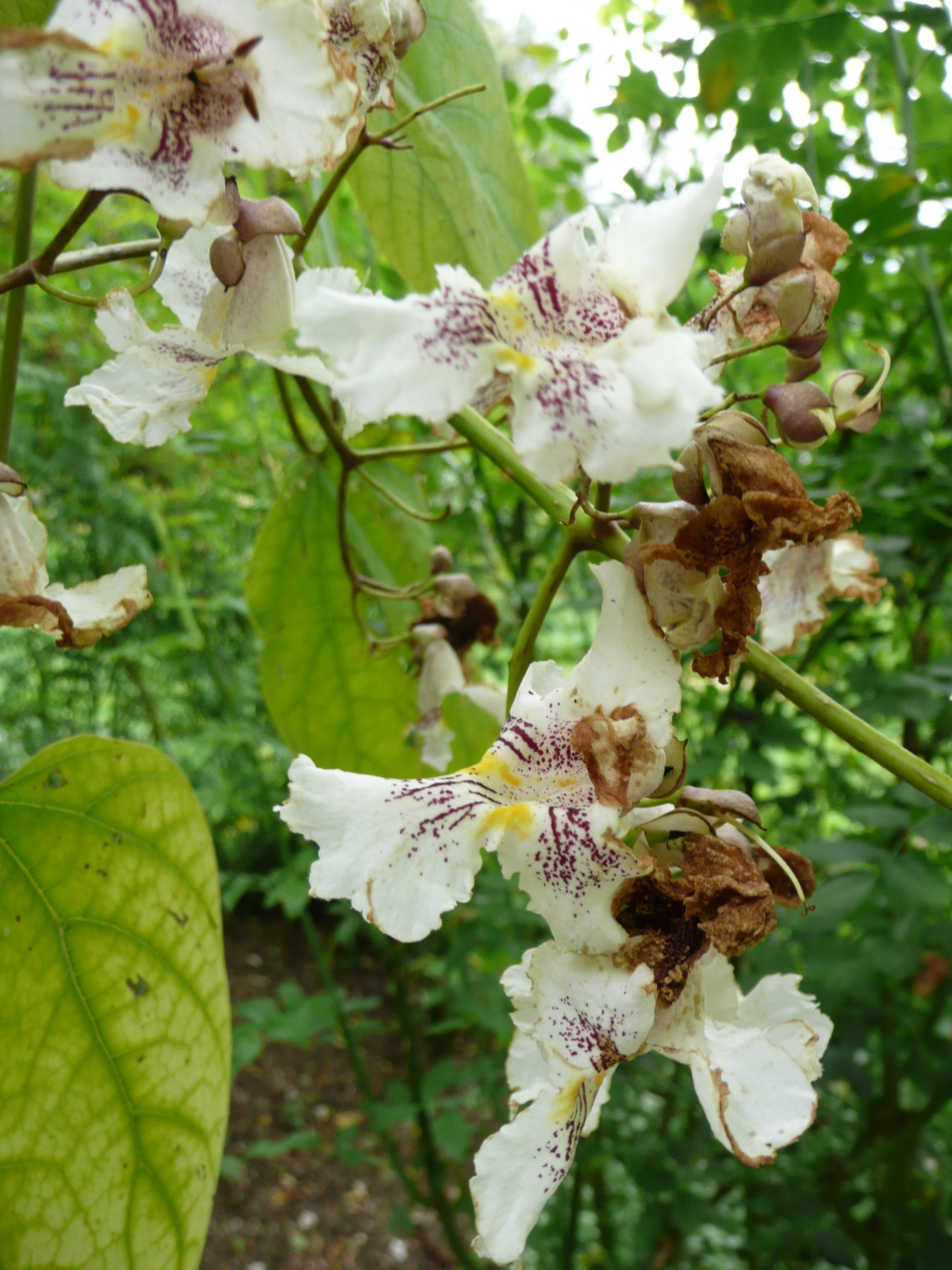 Catalpa speciosa in Jardins de Valloires Map: 50° 20' 50" N 01° 49' 11" E